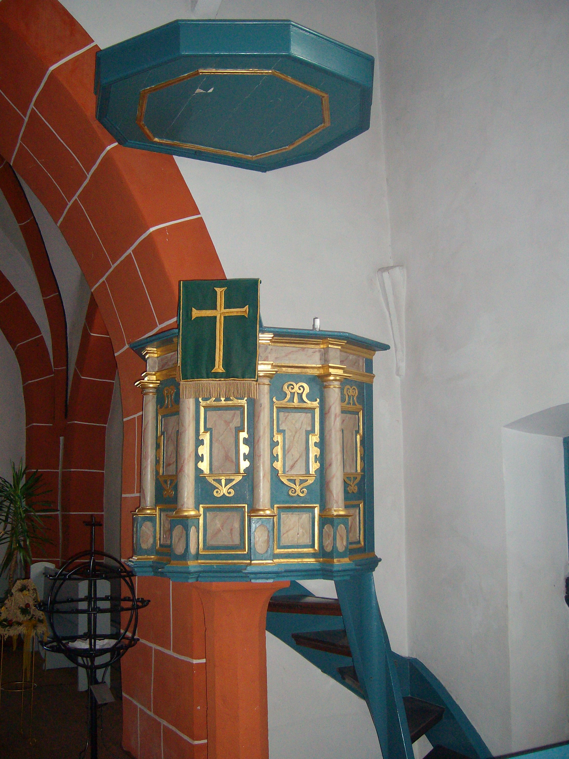 Kanzel der Evangelischen Kirche Gonterskirchen, Laubach, Landkreis Gießen, Hessen, Deutschland